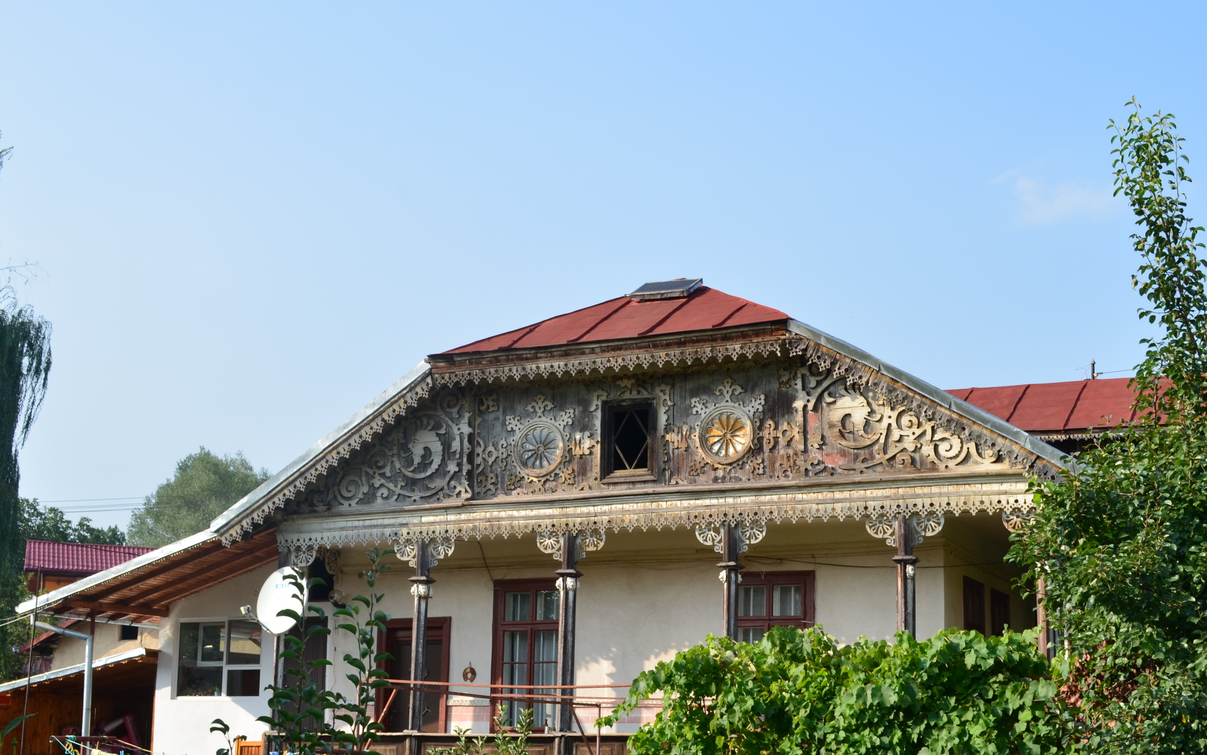 Casa cu prăvălie Ștefan R. Anghel - Poșta veche, Str. 23 August nr. 29, Slănic, Prahova